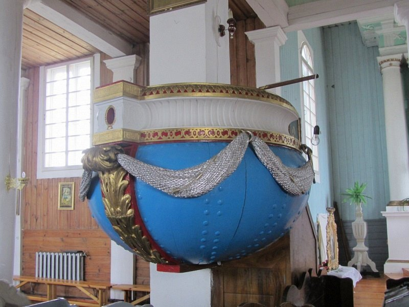 Жырмуны. Касцёл Адшукання Святога Крыжа